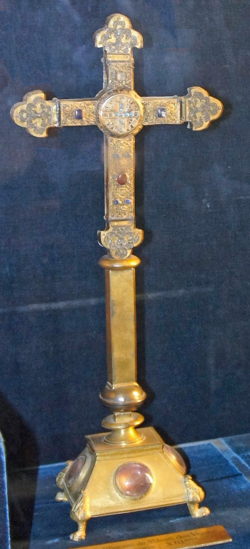 trésor des sacres royaux.